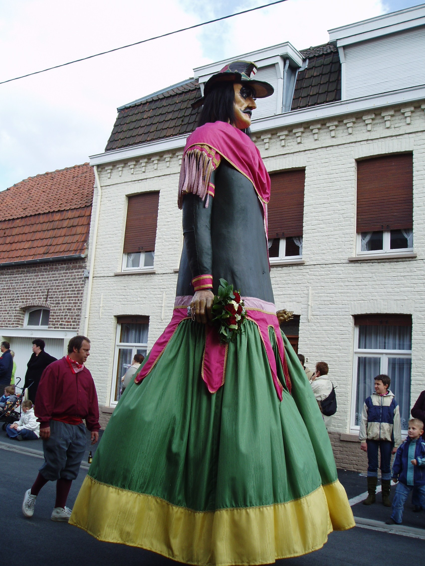 Ronde européenne de géants portés - Steenvoorde 2006 Goliath géant d'Dendermonde